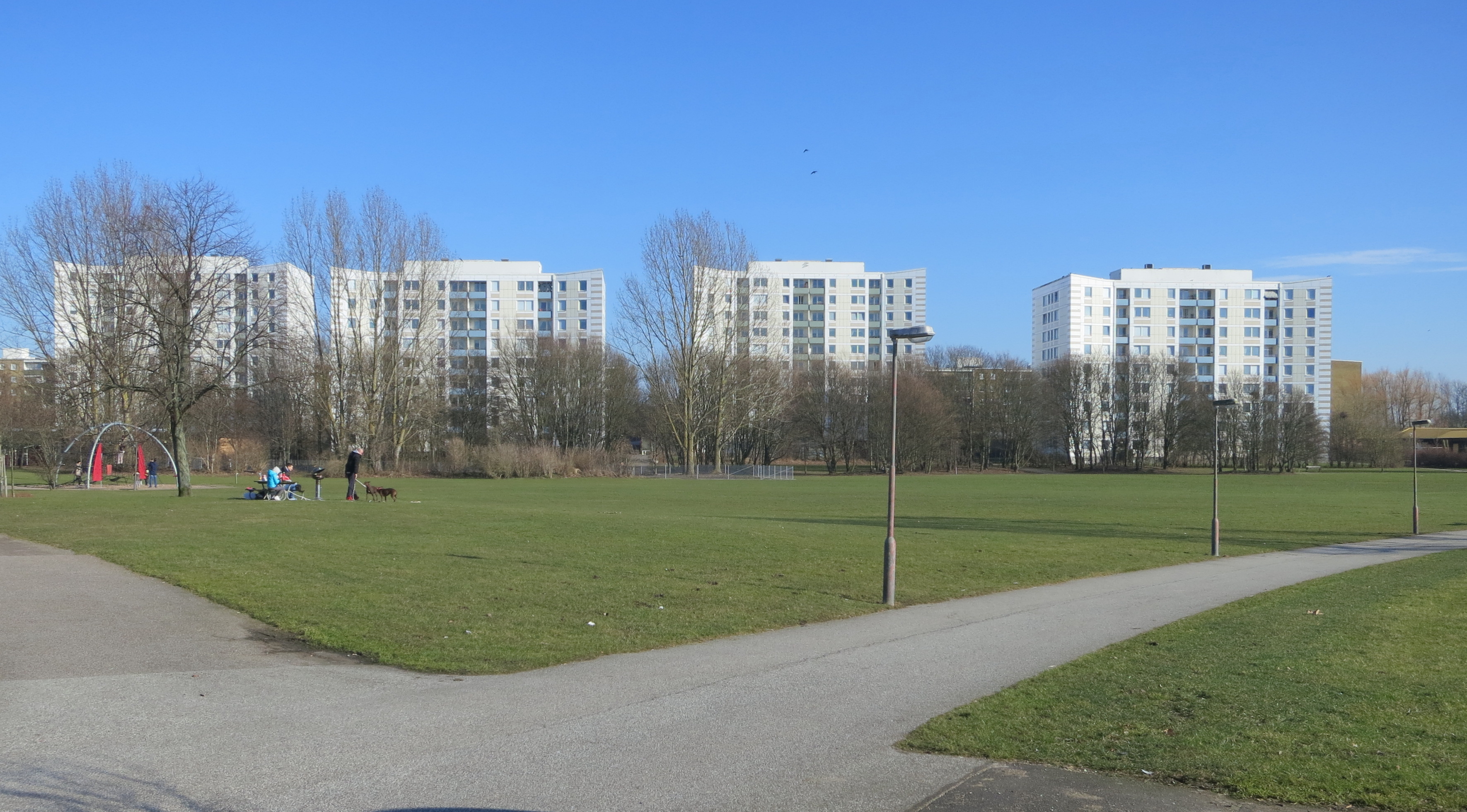 Ögårdsparken i Malmö